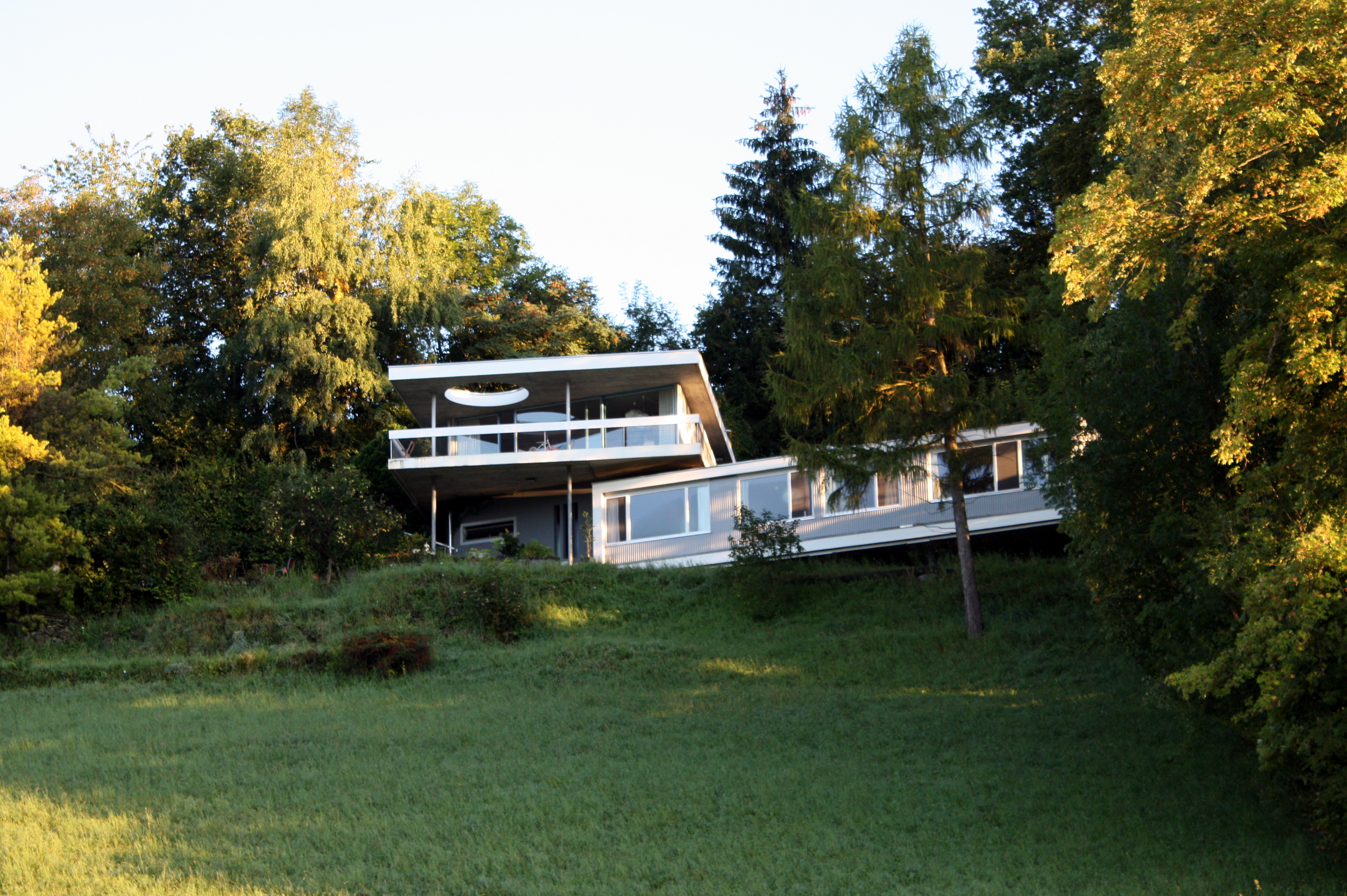 Haus Otto Pfeifer, Hasenberg, Udligenswil